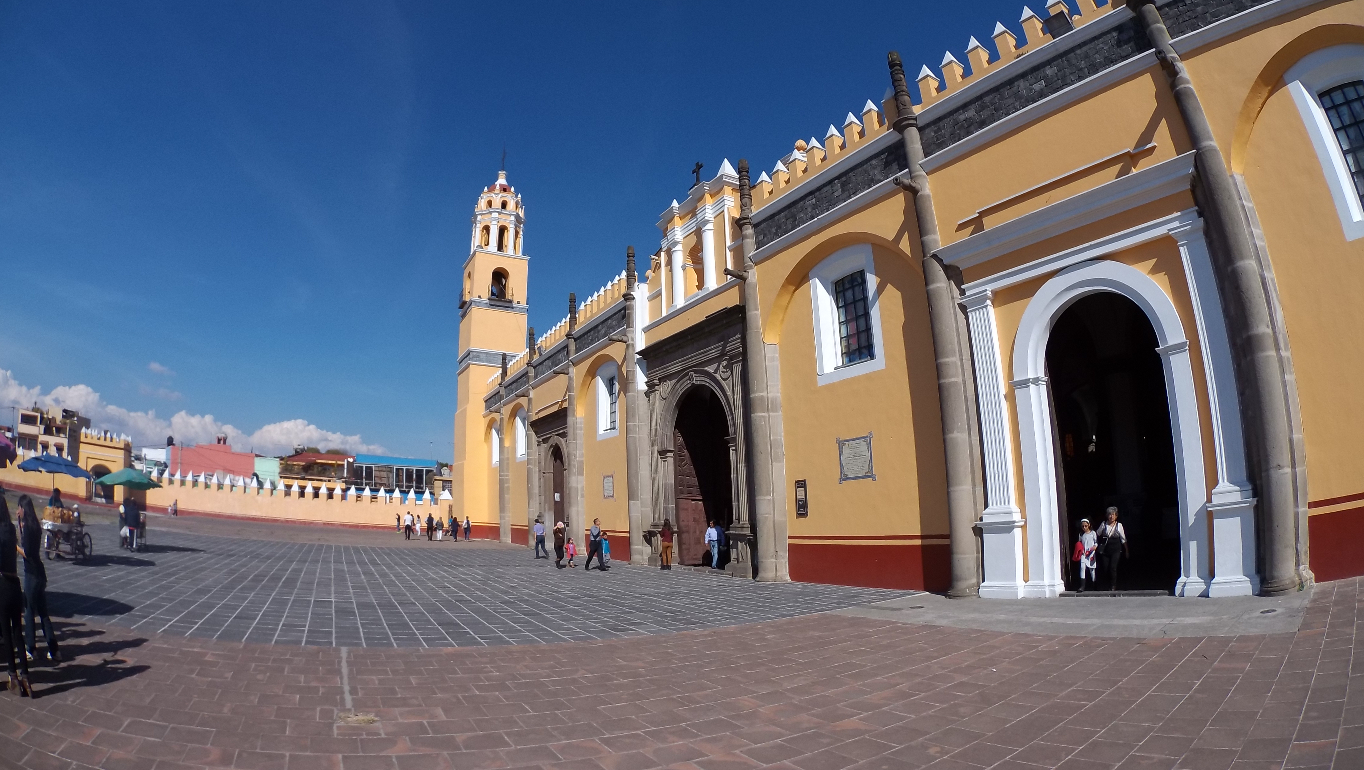 En Cholula, Puebla.